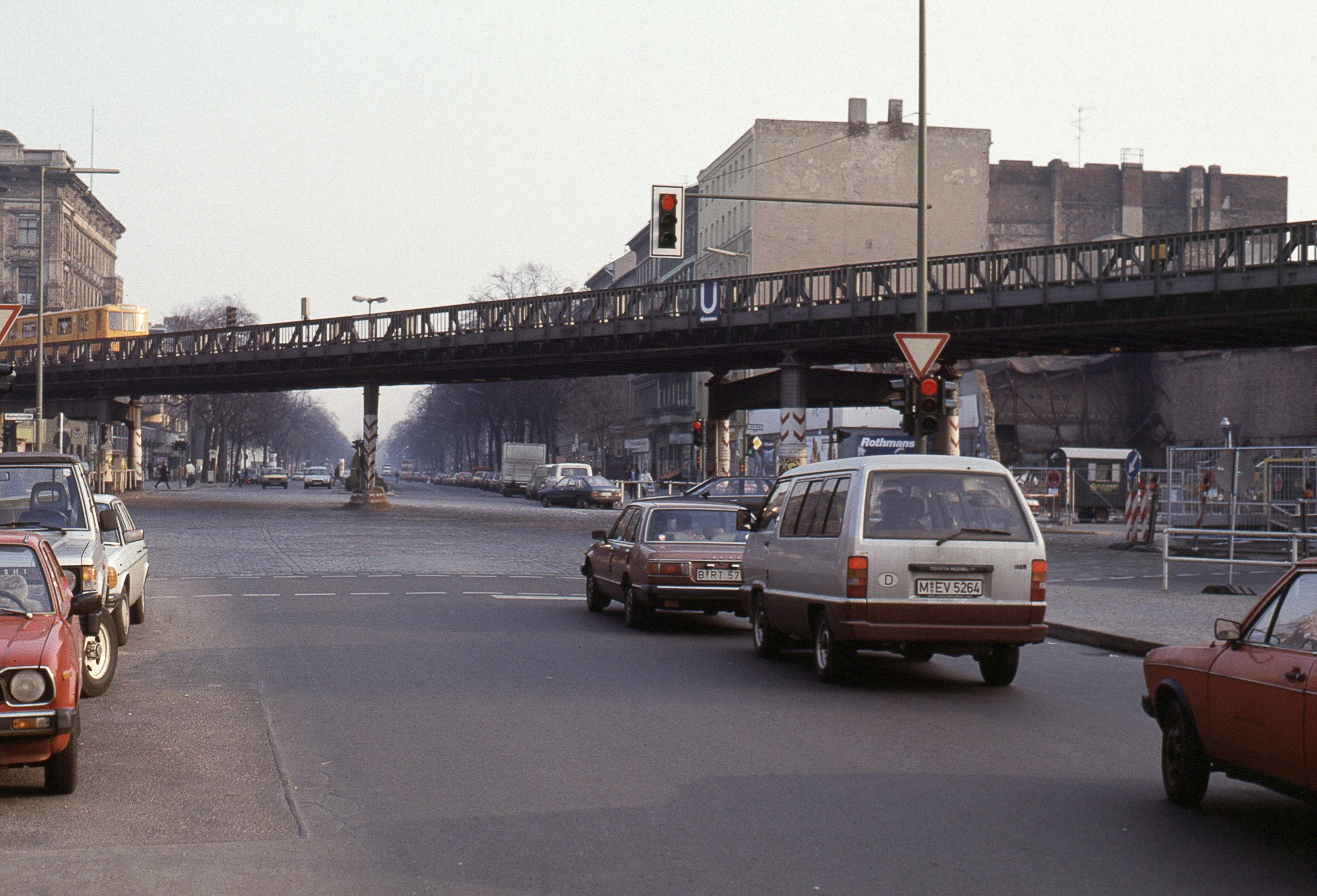 Straßenzug Oranienstraße - Wiener Straße